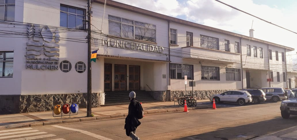 Edificio consistorial de la Ilustre Municipalidad de Mulchén en 2019